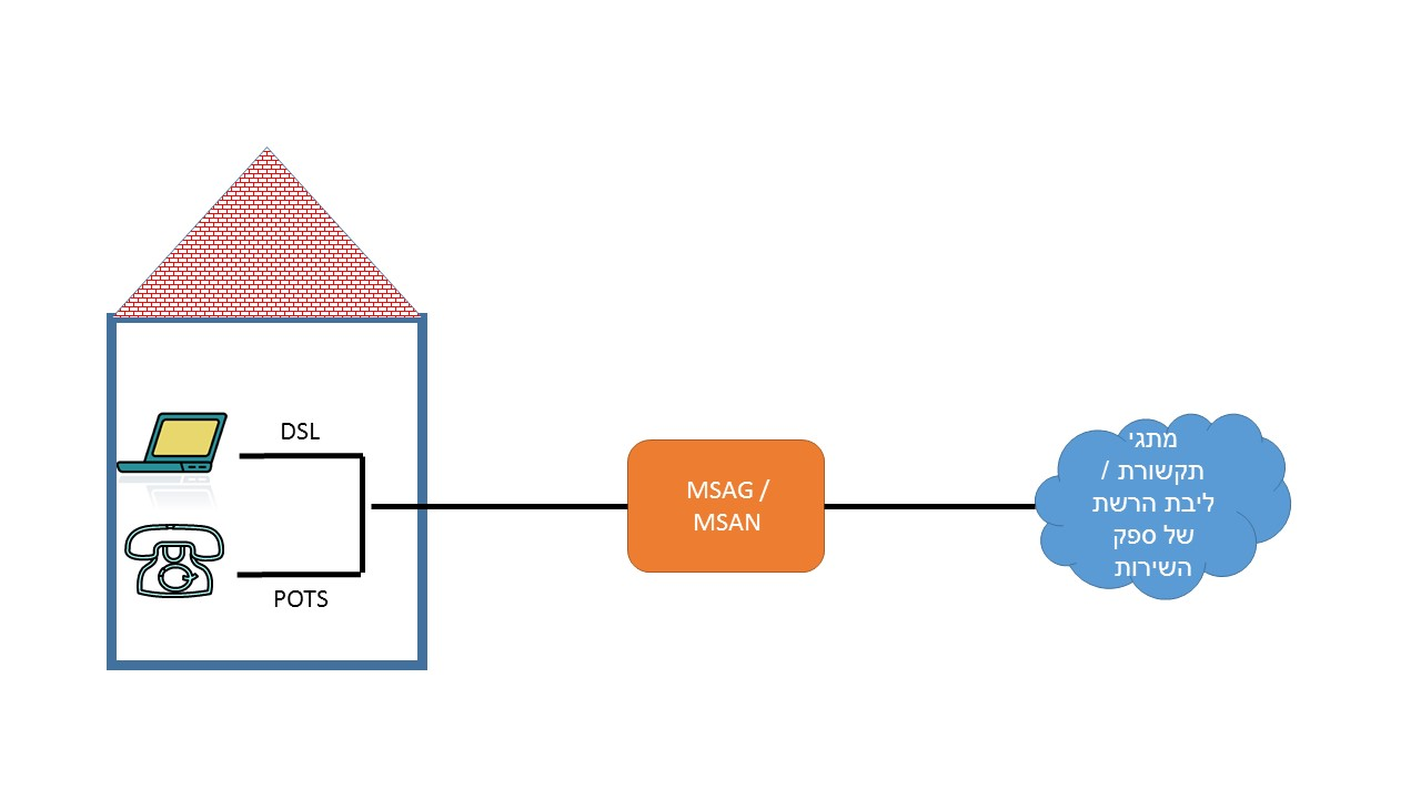 תרשים חיבור מנוי ל-MSAG